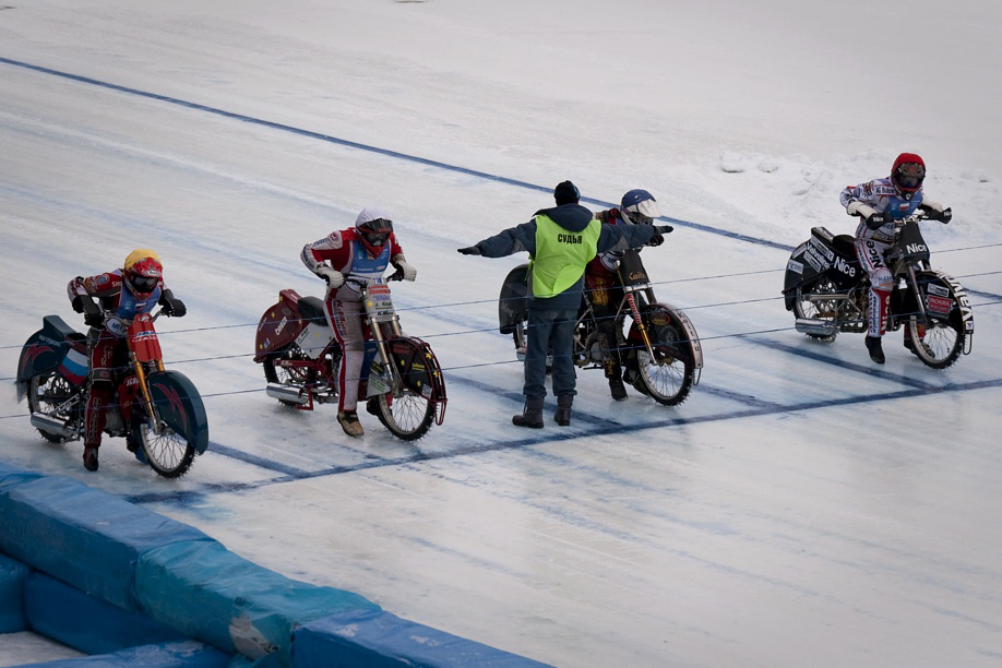 Финал личного чемпионата Европы по мотогонкам на льду. Тольятти. Россия